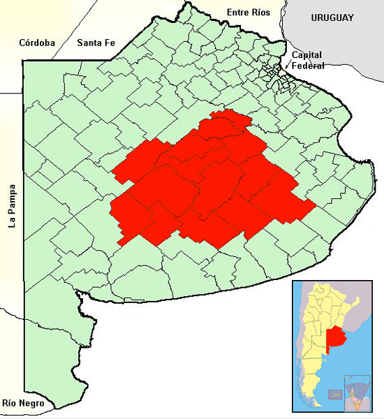 Mappa della Diocesi cattolica di Azul, nella provincia di Buenos Aires (Argentina)